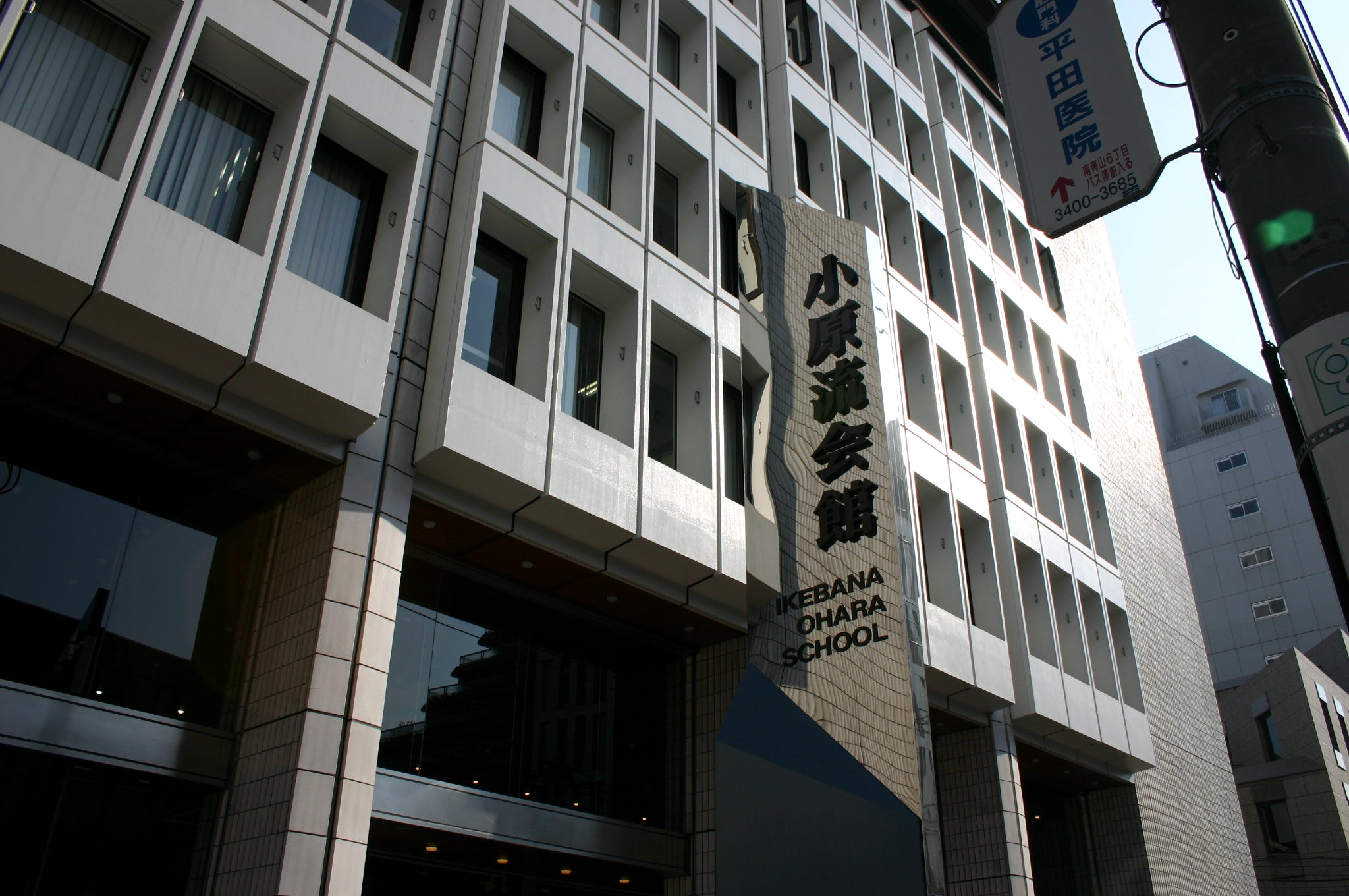 Sede della scuola di ikebana Ohara di Tokyo a Omotesando